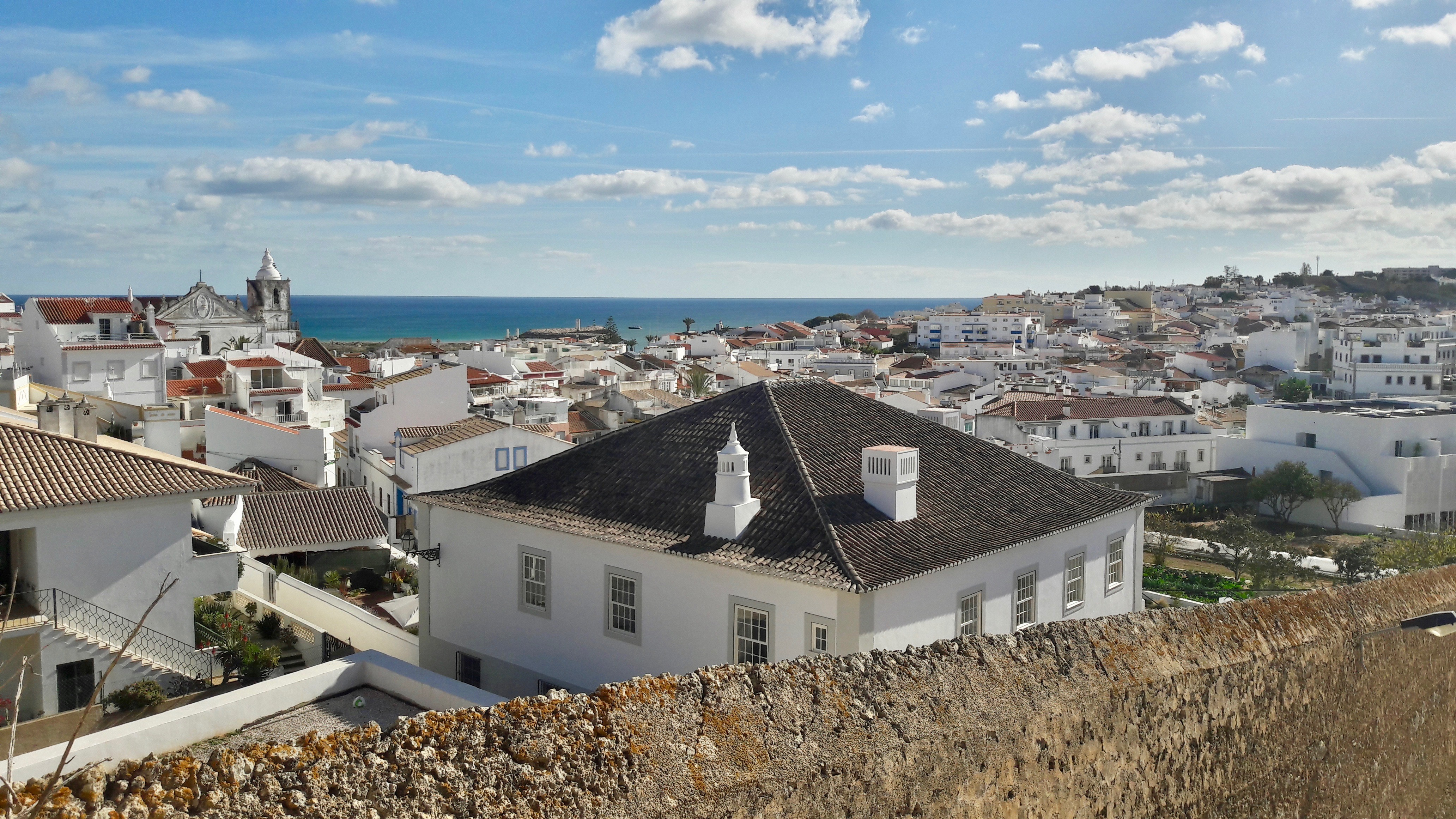 Vista do Centro Histórico de Lagos